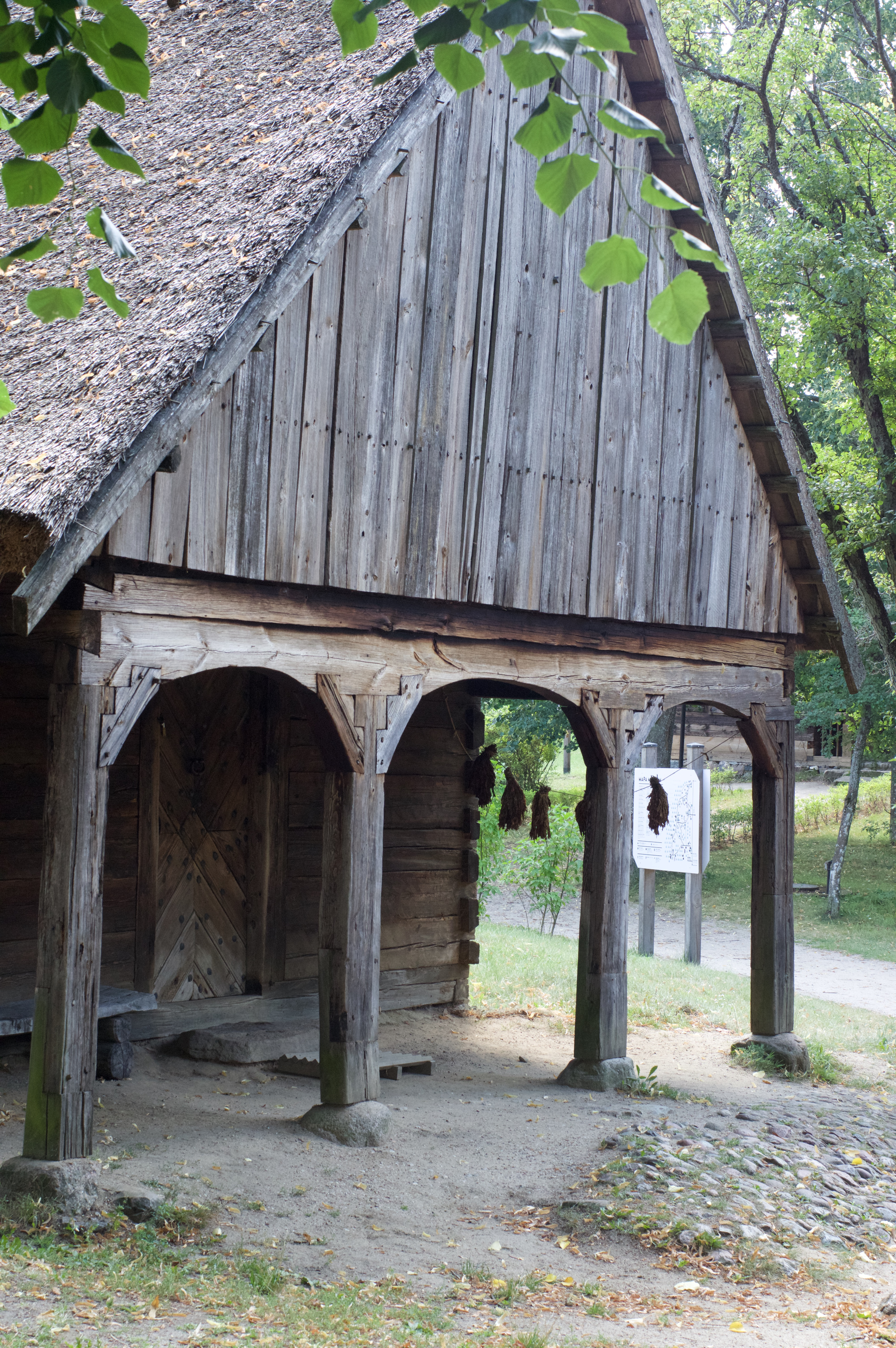 Chata 1